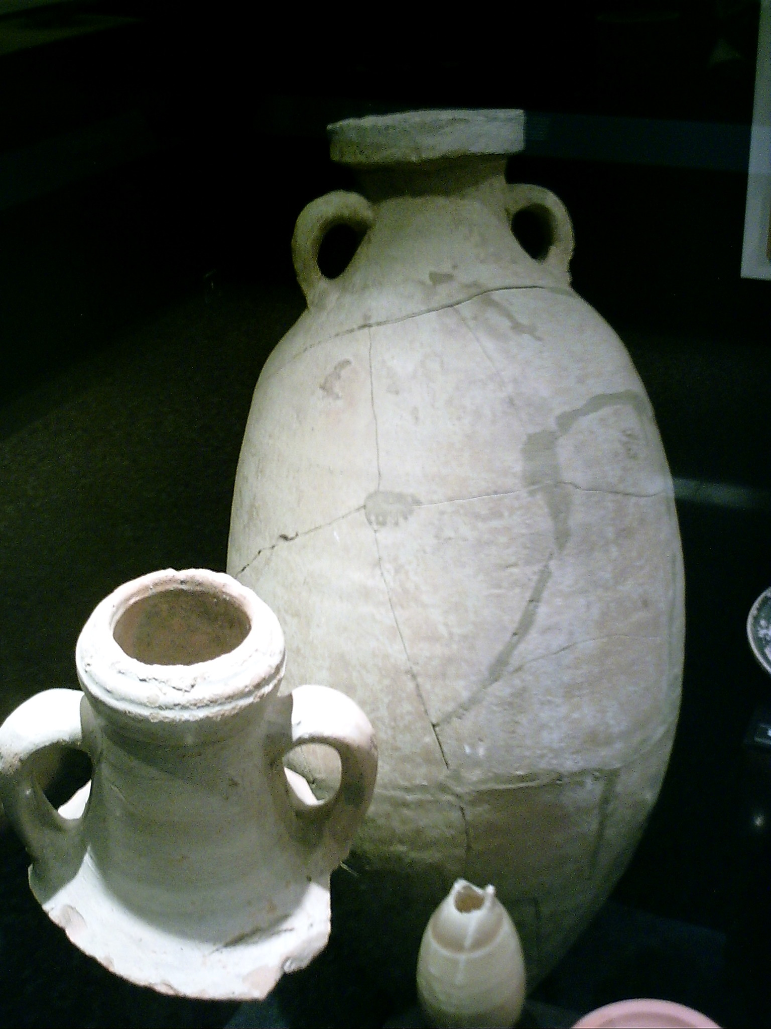 Vas i àmfora de l'época romana, al Museu de Badalona, Badalona, Barcelonès, (Catalunya).